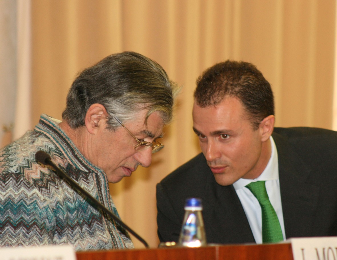 Umberto Bossi e Marco Reguzzoni